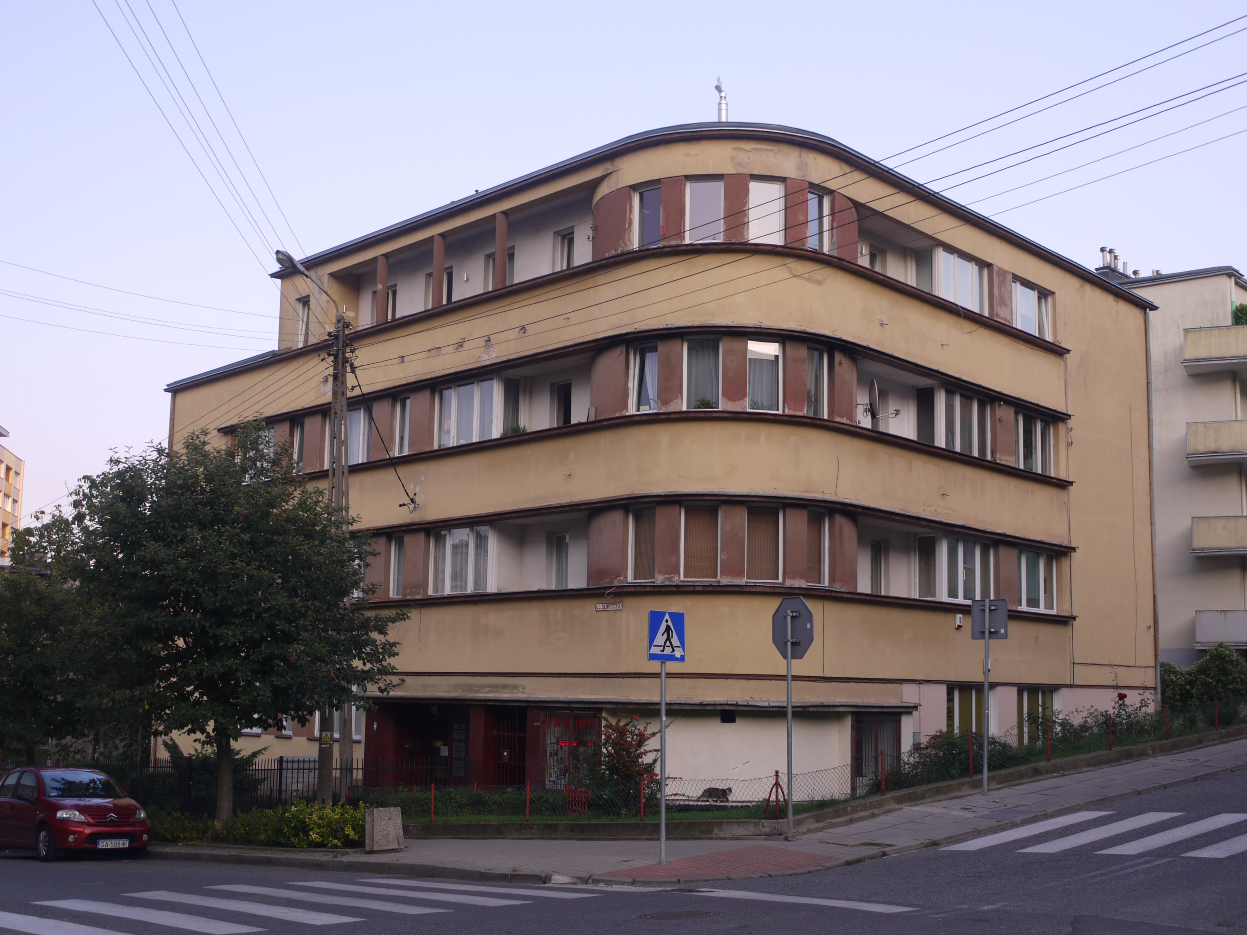 Gdynia, ul. Słupecka 9 - dom czynszowy z garażem (Kamienica Antoniego i Bronisławy Konopków), 1938